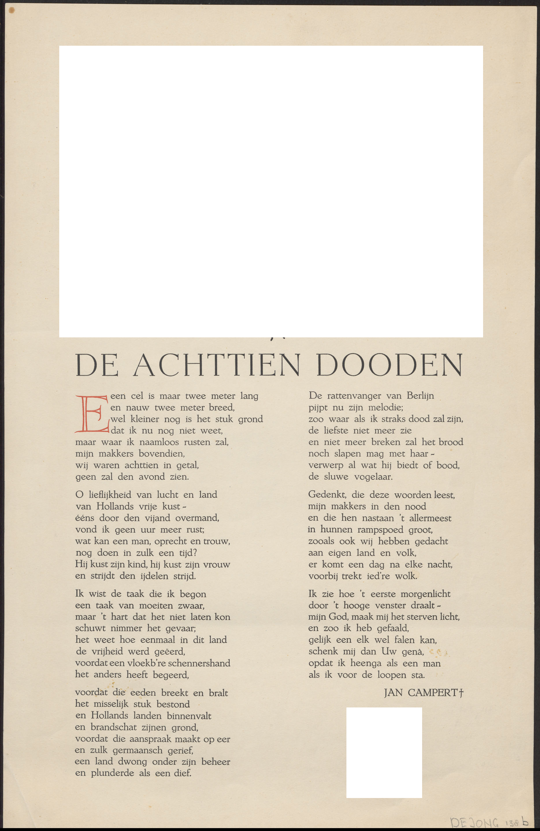 Rijmprent met de Achttien Dooden, uitgegeven door De Bezige Bij, met hier vanwege het auteursrecht weggelaten de tekening en vignet van Coen van H., d.i. Fedde Weidema. 2e druk (zetfout met een E teveel begin eerste zin)